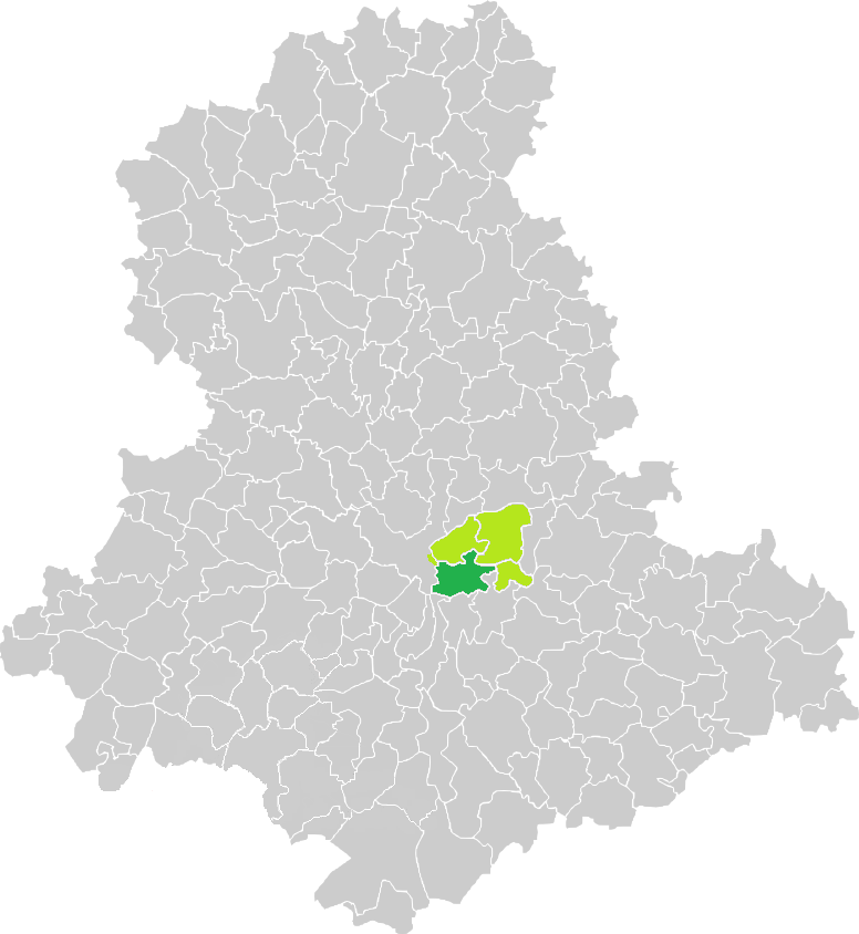 Carte de situation de la commune de Feytiat (en vert foncé) dans le votre Canton (en vert clair) sur une carte des communes de la Haute-Vienne